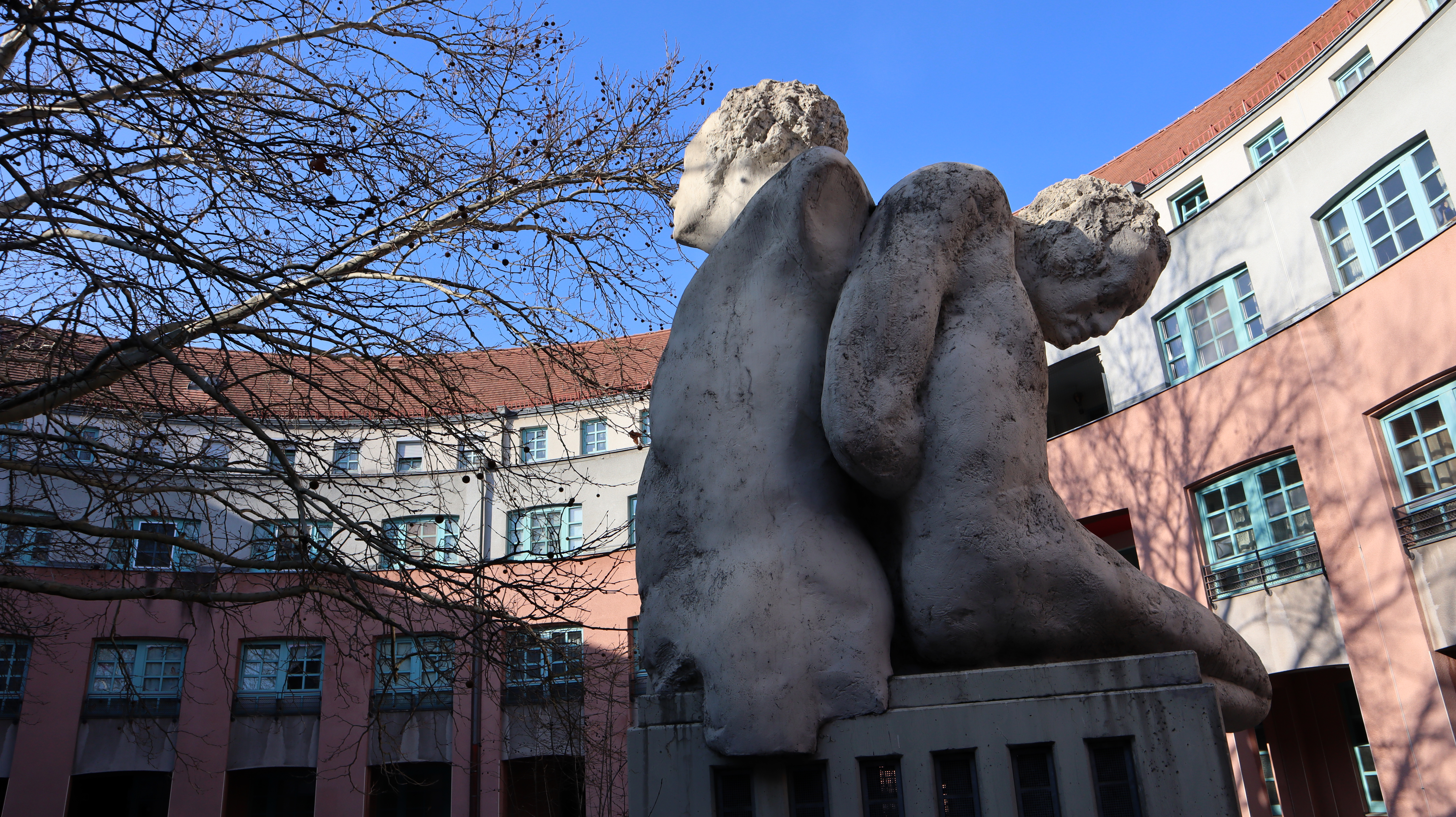 Kommunaler postmoderner Wohnbau, Postmoderne Anlage von Krier, Wachberger, Gebhart